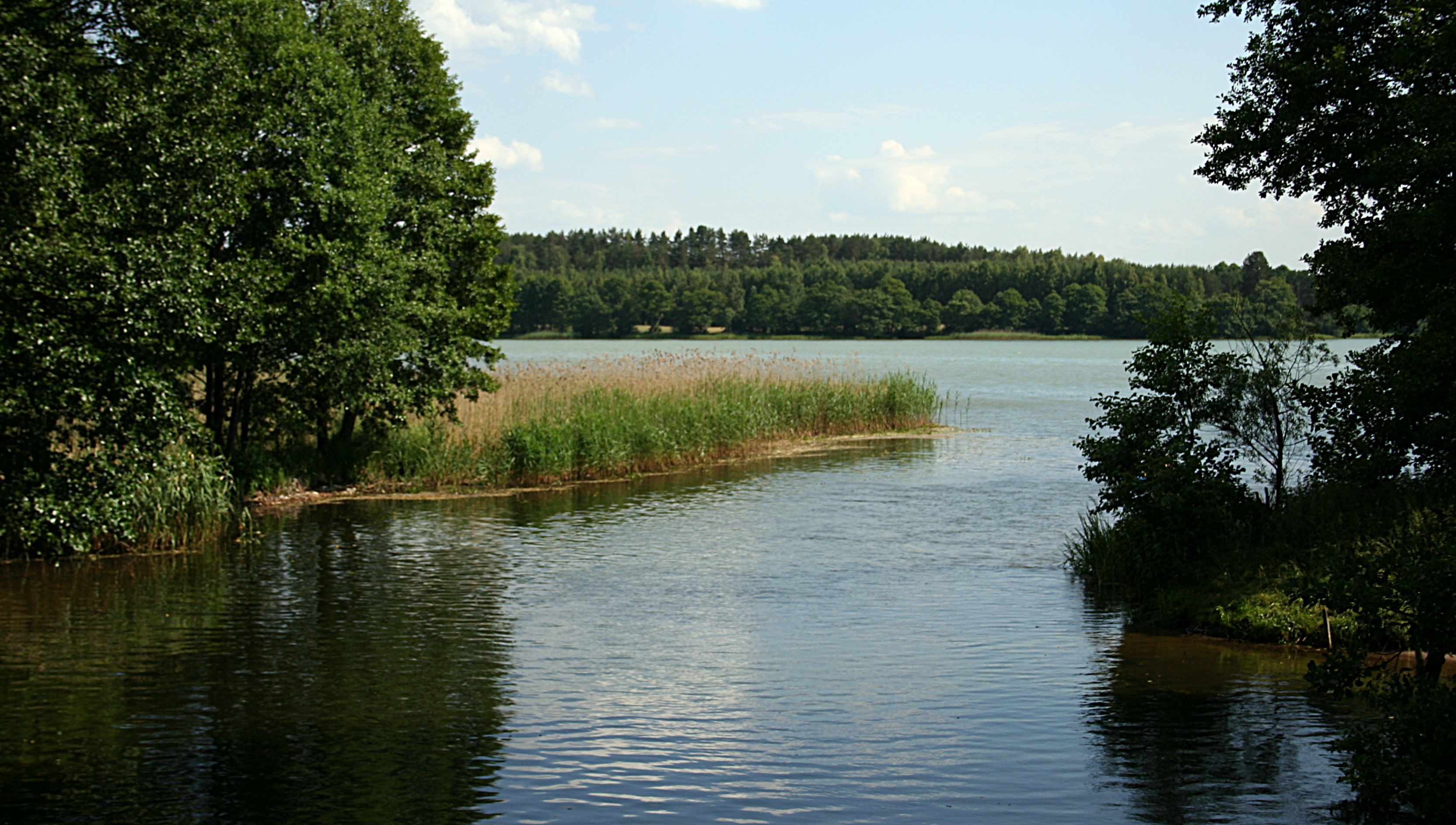 Wdzydzki Park Krajobrazowy, Wda wpływająca do jeziora Radolne